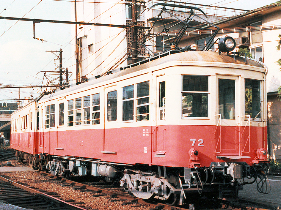 高松琴平電鉄 70形72（後は20形24）